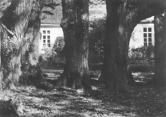 Беларуская (тарашкевіца): Райца (Rajca), сядзіба Верашчакаў (Vieraščaka)